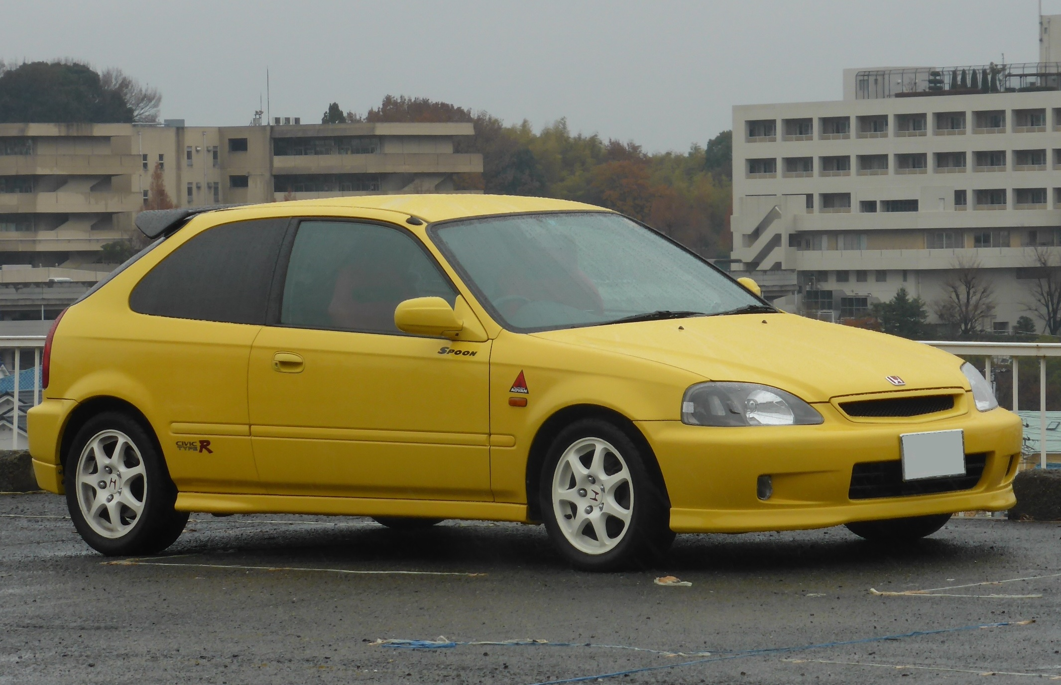 EK9型ホンダ・シビックタイプRを右から撮影。